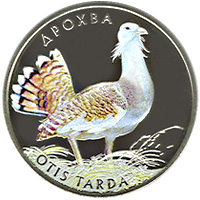 Дрохва реверс